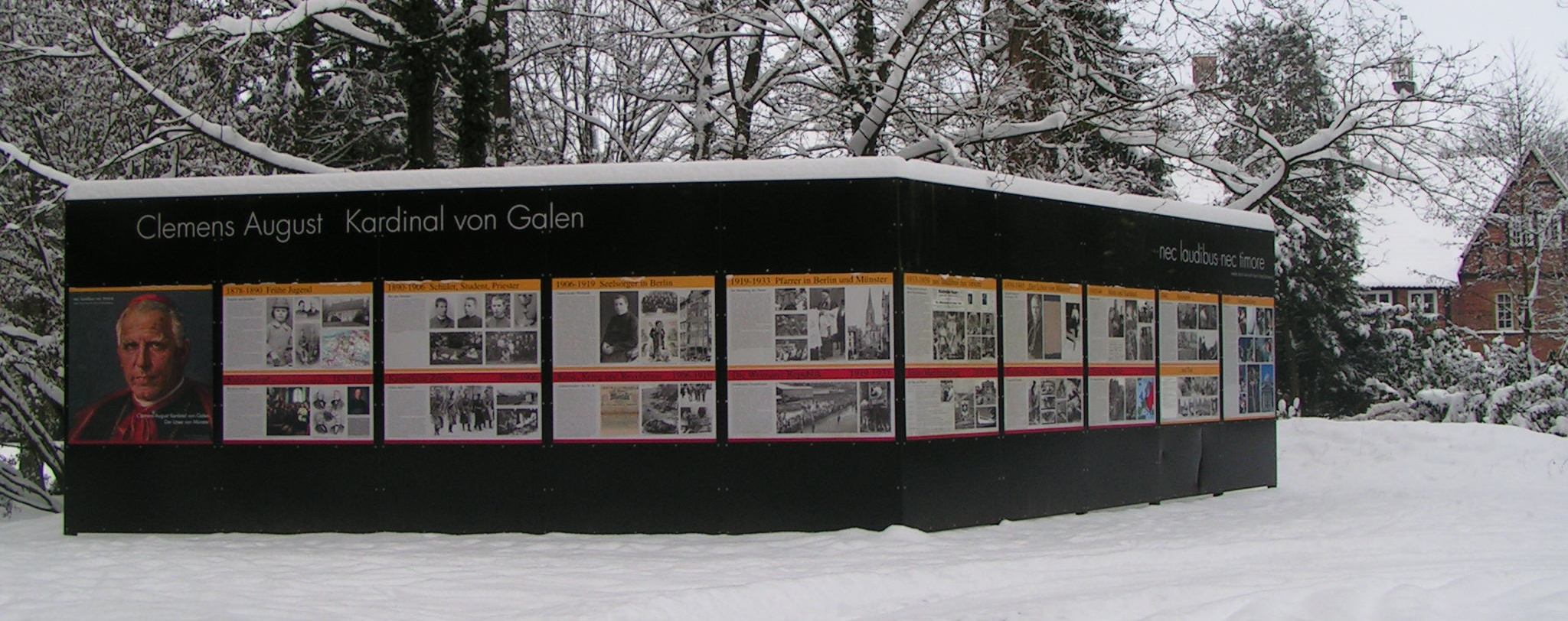 Infowand zum Gedenken an Kardinal Clemens-August Graf von Galen an seiner Geburtsstätte, der Burg Dinklage (heute Benediktinerinnenkloster)